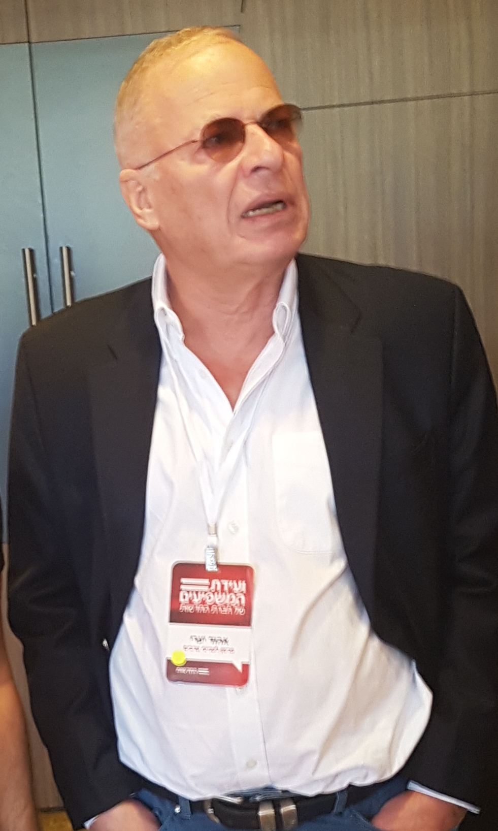 Ehud Yaari